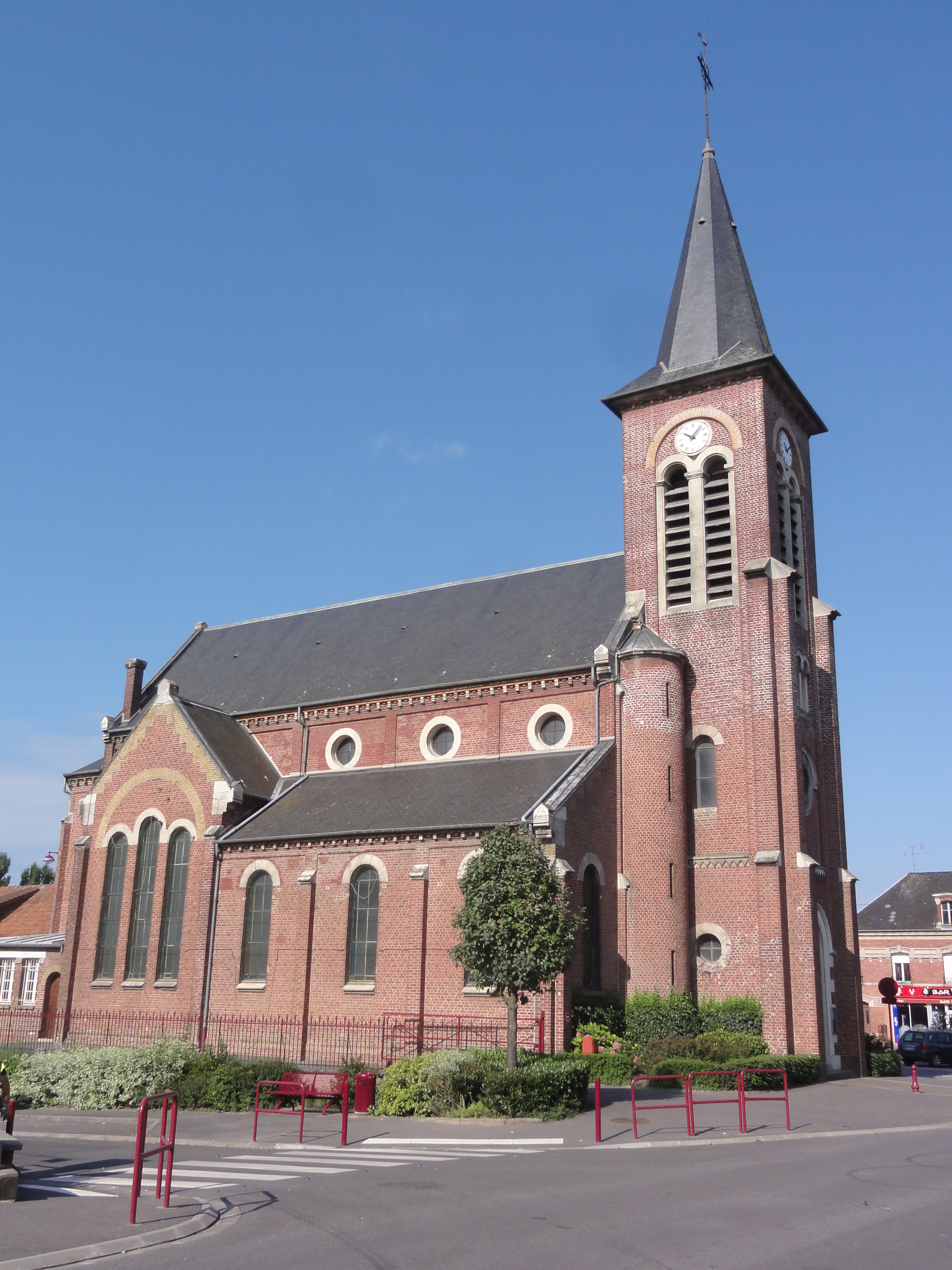 Viry-Noureuil (Aisne) église